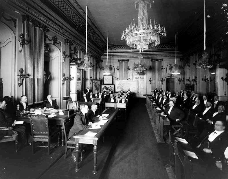 Interiör från Stadsfullmäktige i Börssalen, Börshuset på Stortorget